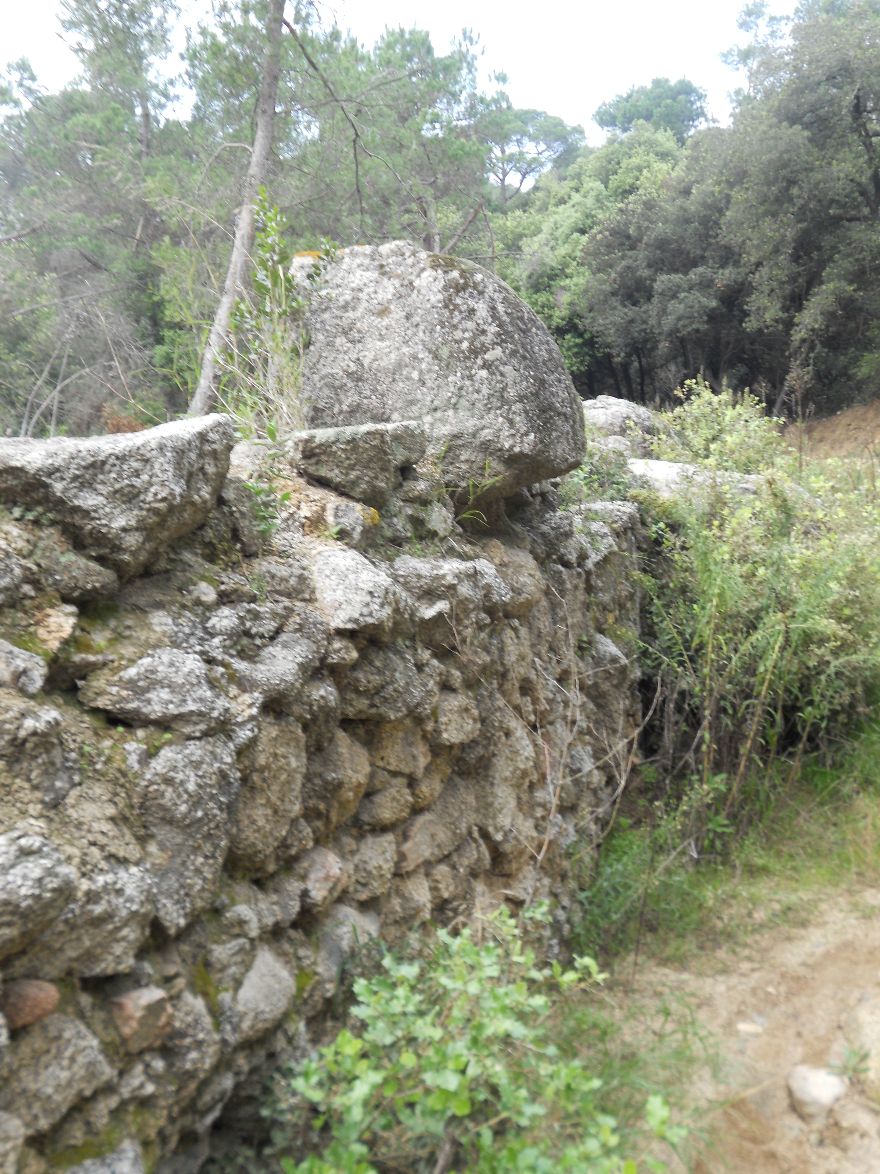 Detall dels contraforts amb un guarda-rodes, de la via romana de Parpers, coneguda com Via Sèrgia, que anava des d'Iluro (Mataró) fins Ausa (Vic).